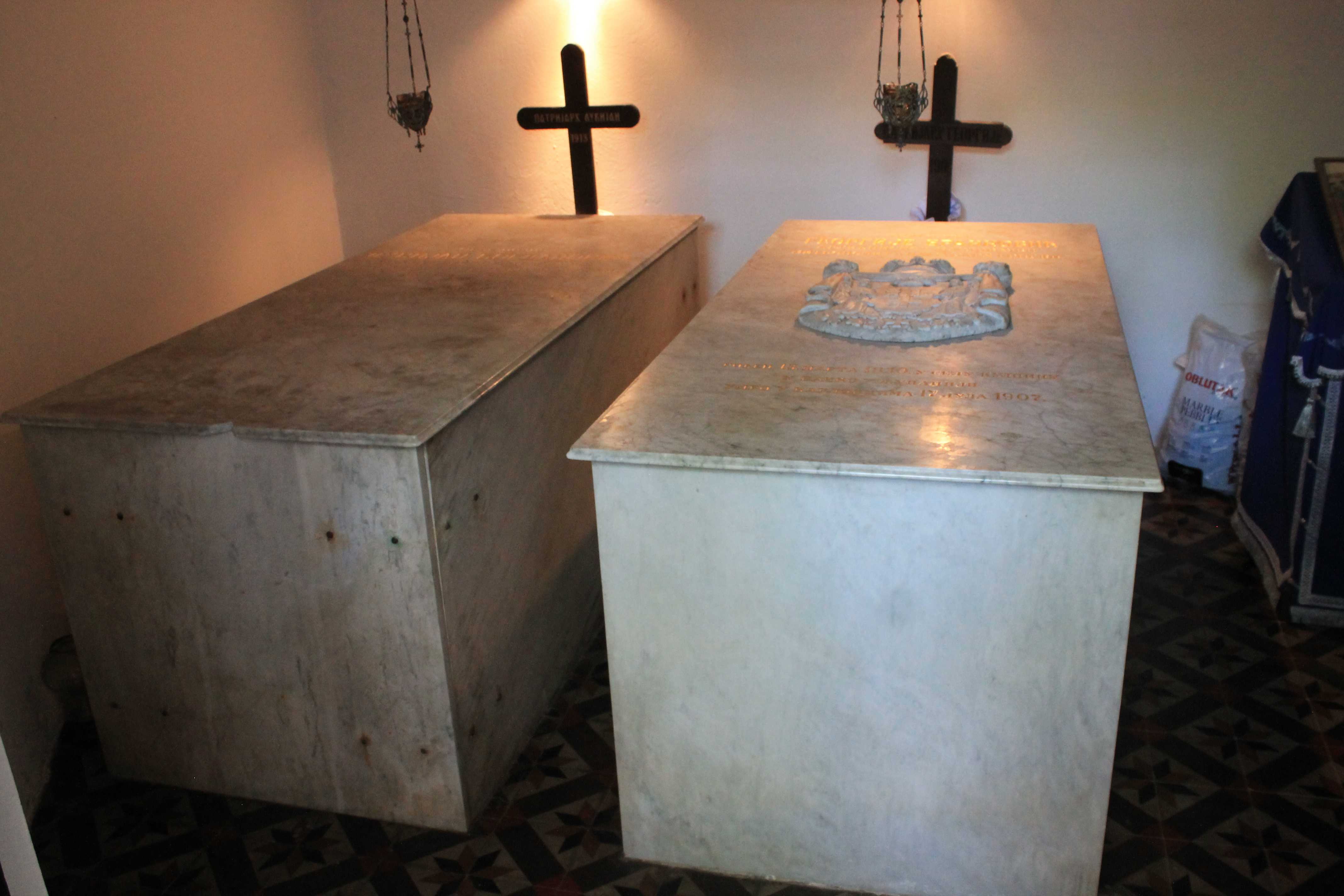 Манастир Ваведења Пресвете Богородице, Сремски Карловци